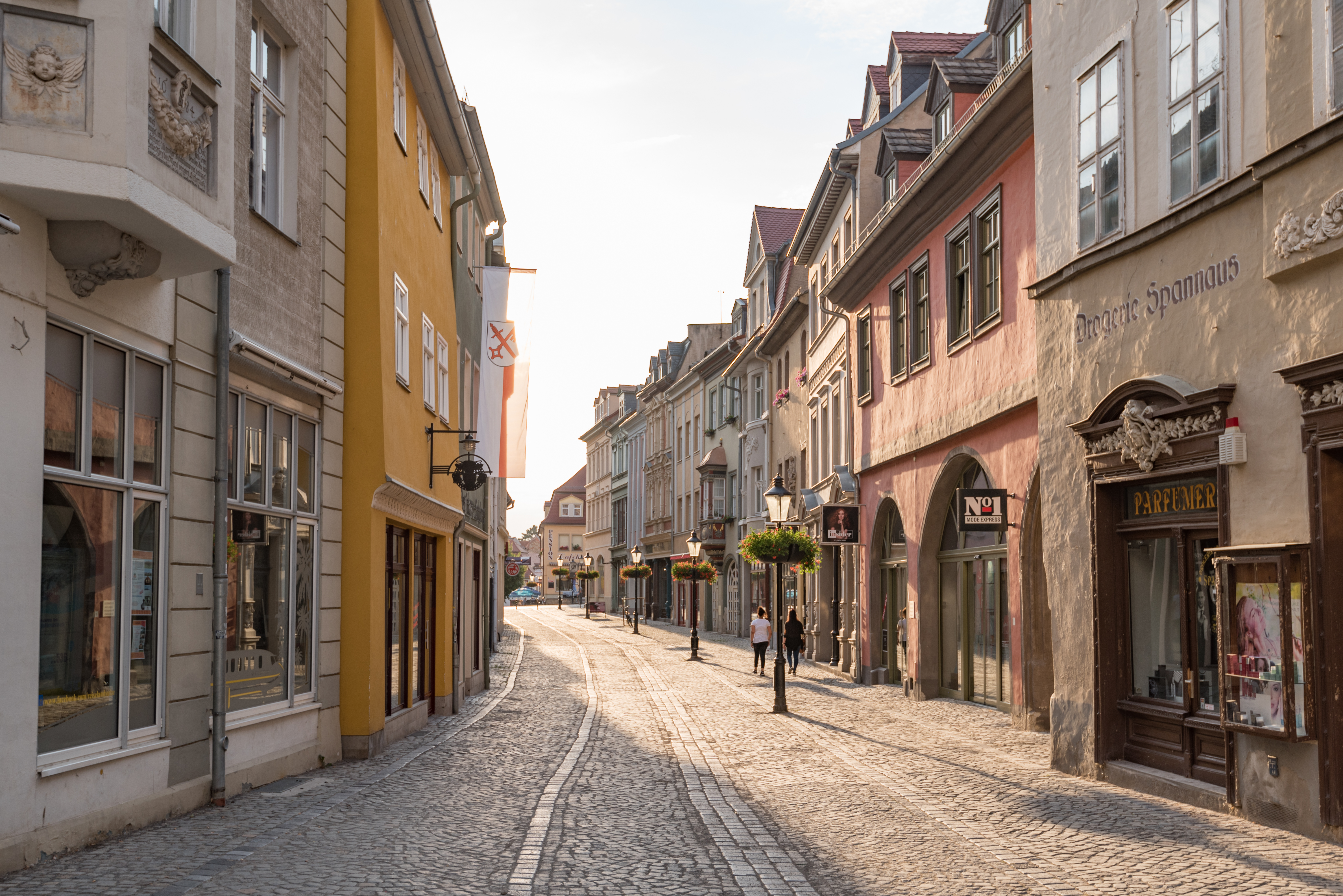 Naumburg (Saale), Herrenstraße, von Osten